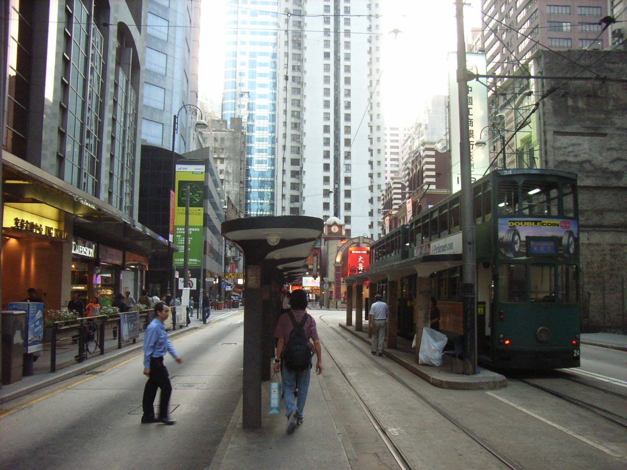 上環電車總站 HK Tram Station, Sheung Wan, Hong Kong